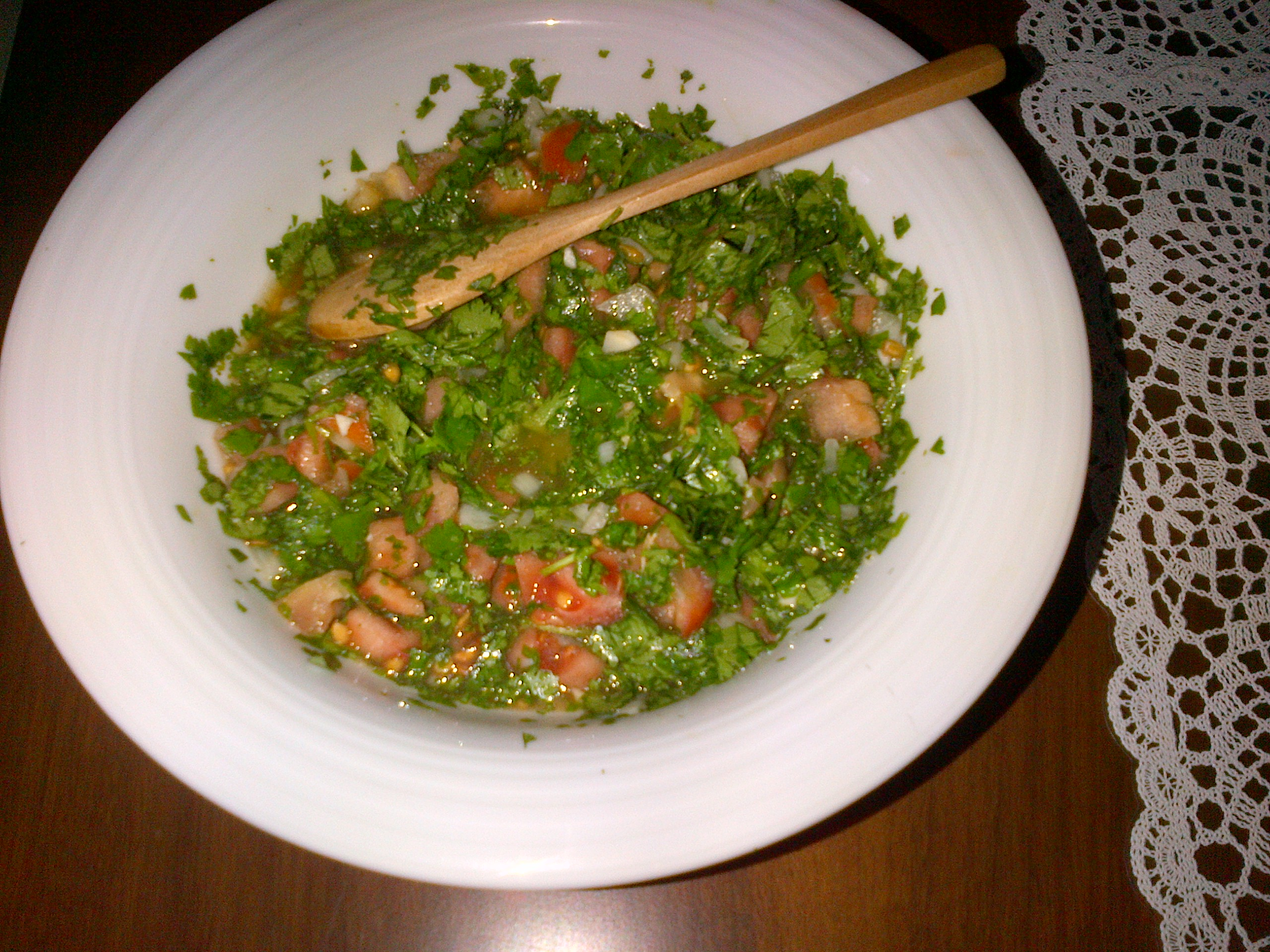 Pebre de la cocina chilena.